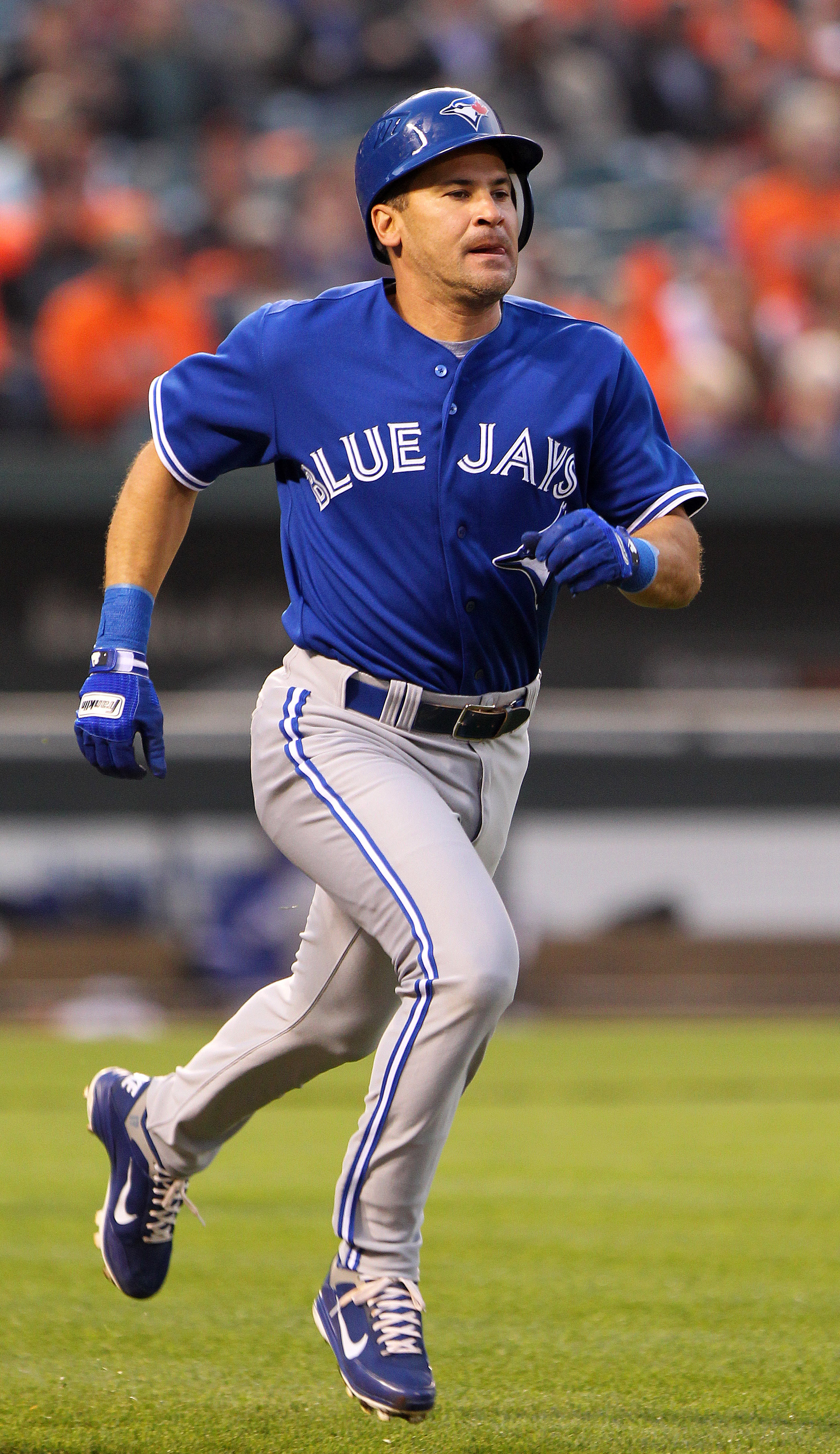 Omar Vizquel